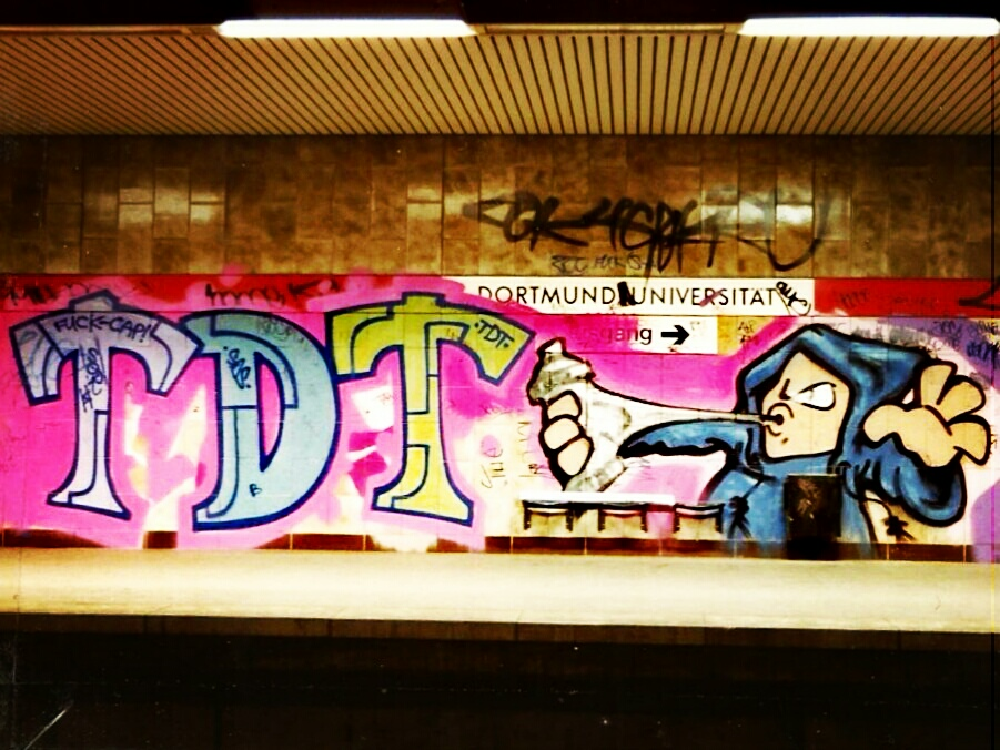 Haltepunkt UniDo der S1/S21